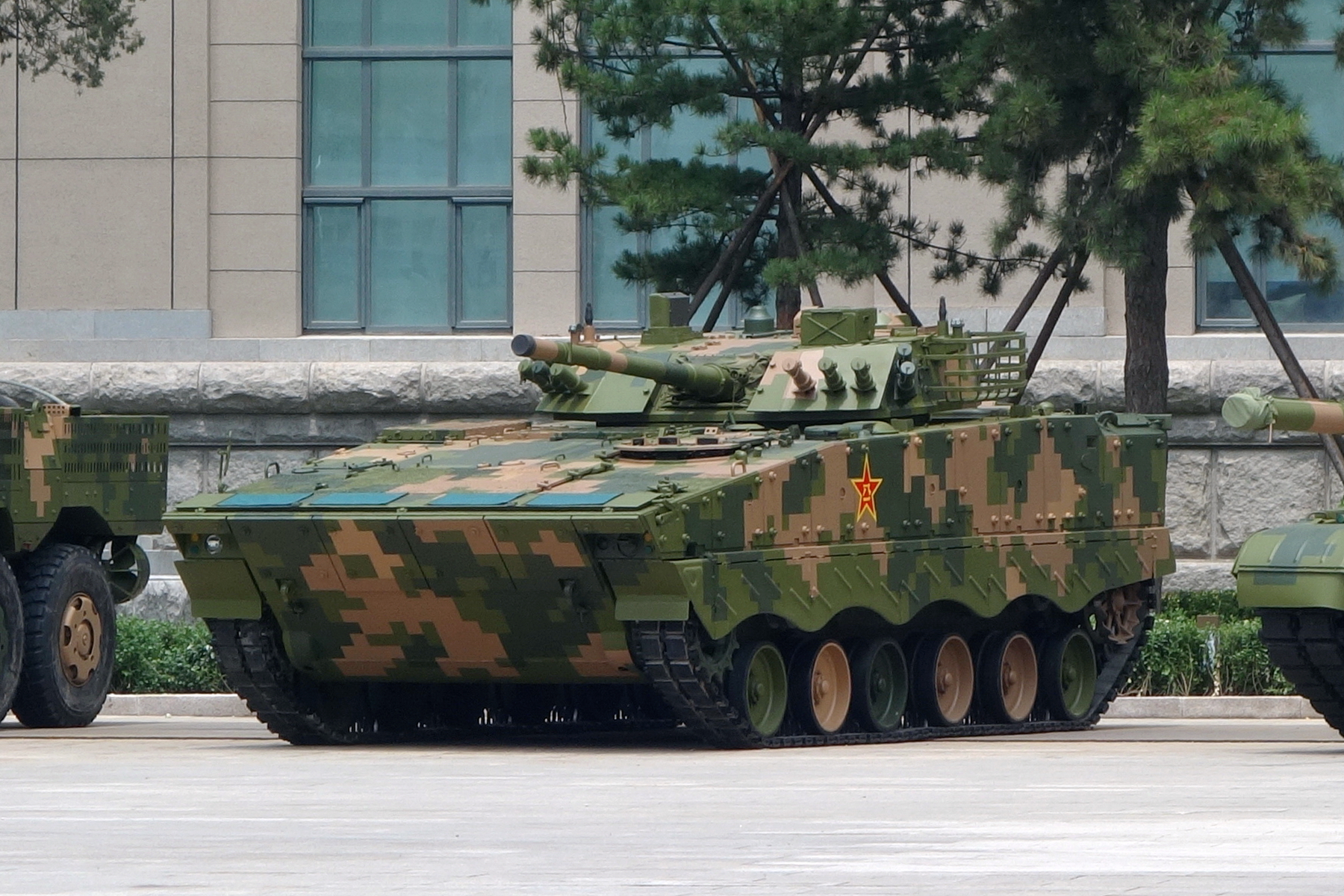 ZBD-04A步兵战车，拍摄于中国人民革命军事博物馆